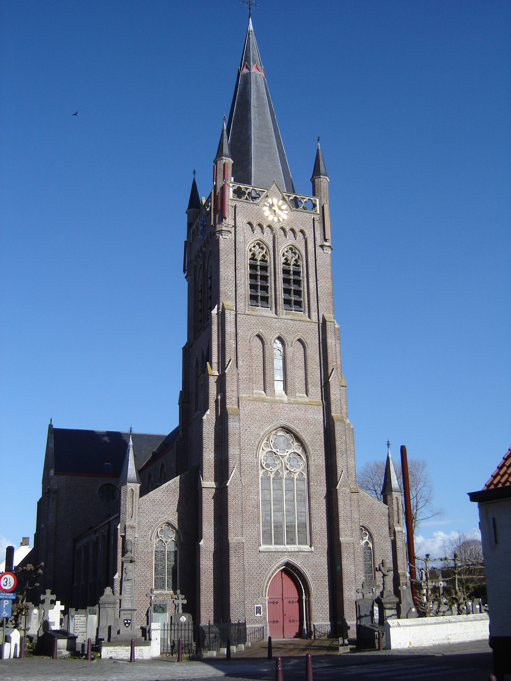 Sint-Blasiuskerk Church of Saint Blaise in Jabbeke, West Flanders, Belgium